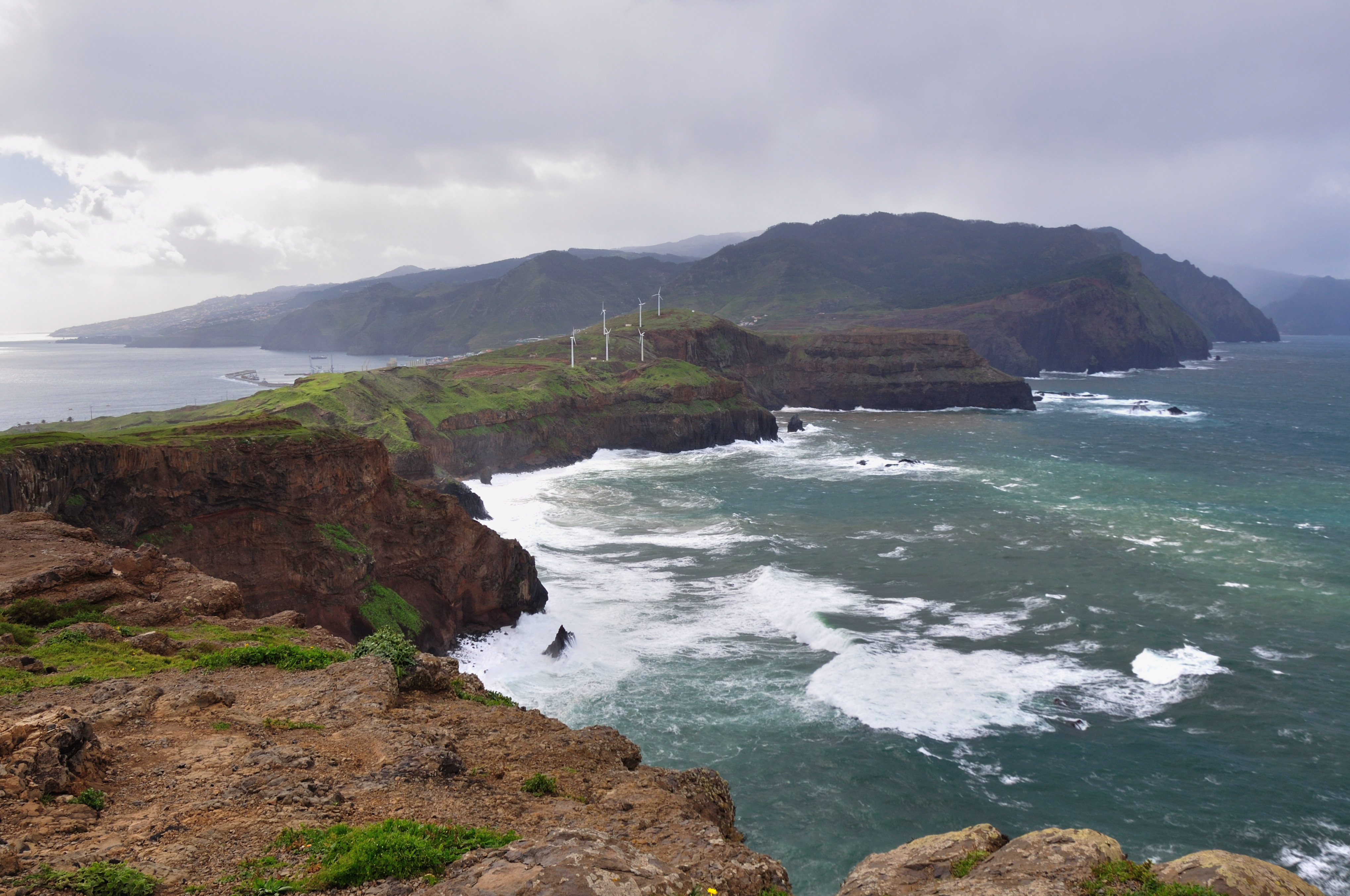 Portugal, Ponta de São Lourenço , view towards mainland Madeira